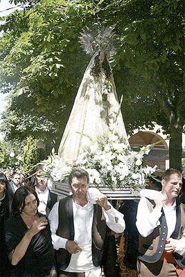 soria